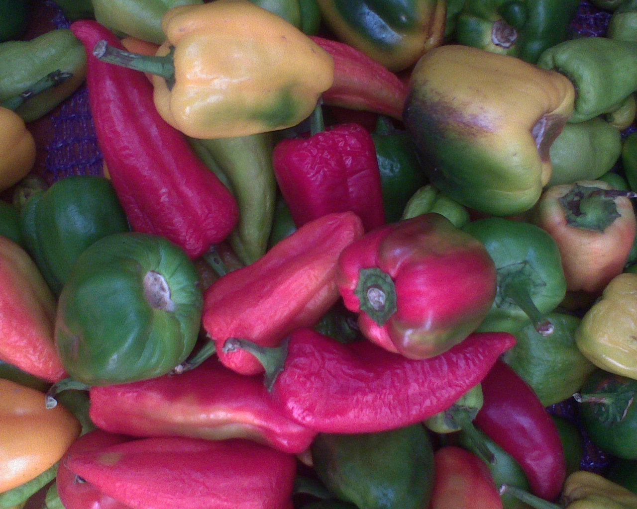 Вінницькі перці